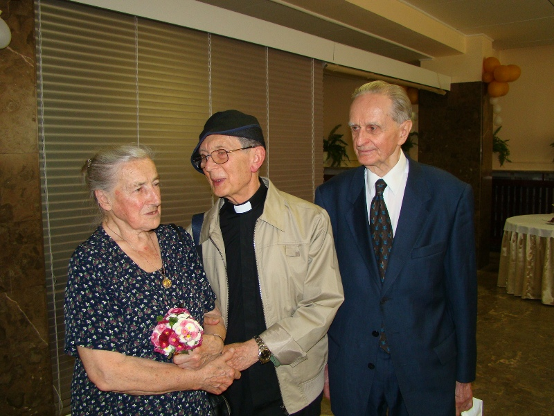 podczas doktoratu honoris causa dla dr Wandy Półtawkiej na KUL